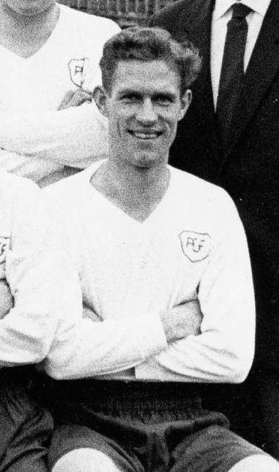 Hans Christian Nielsen